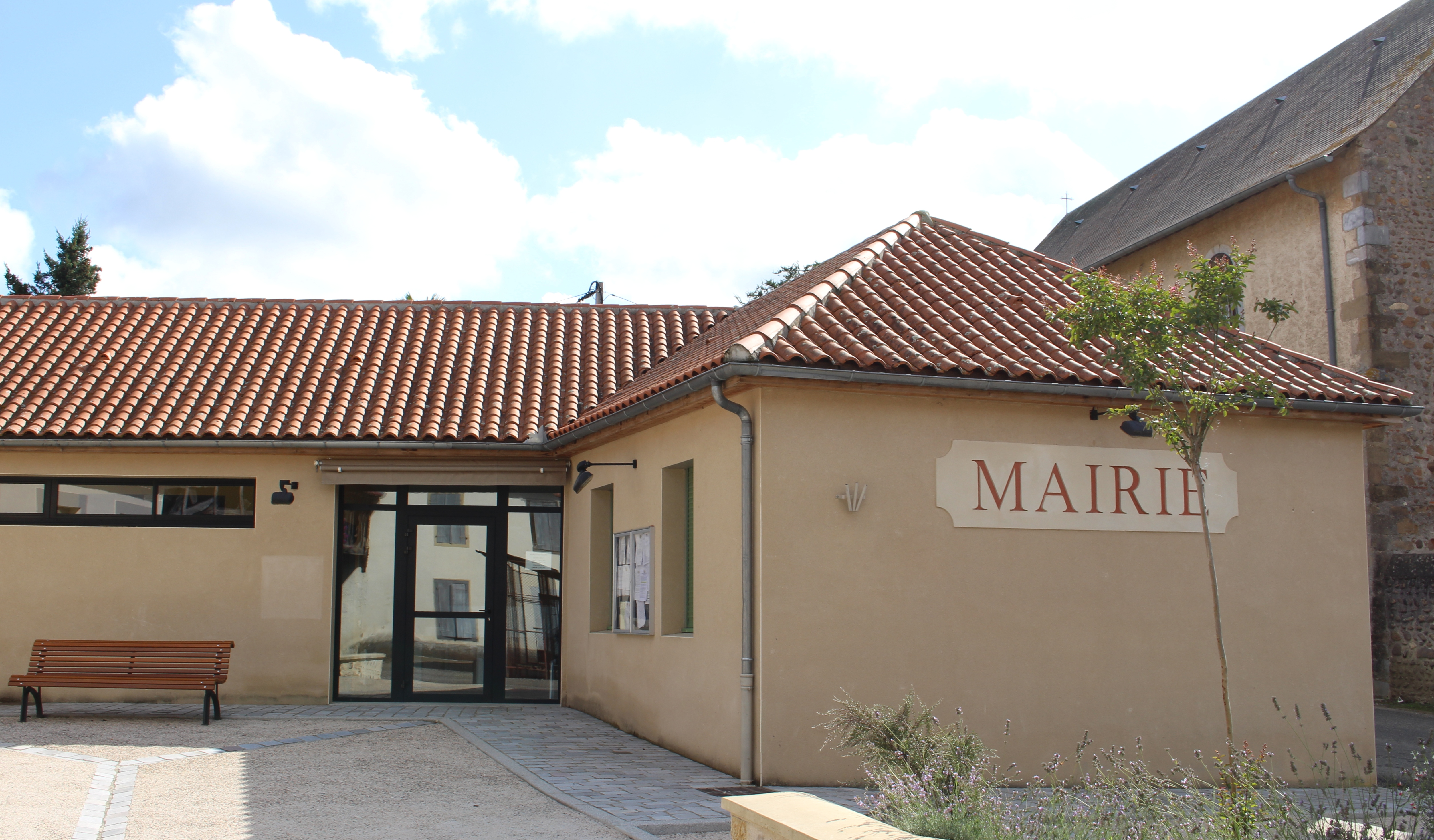 Mairie de Moulédous (Hautes-Pyrénées)